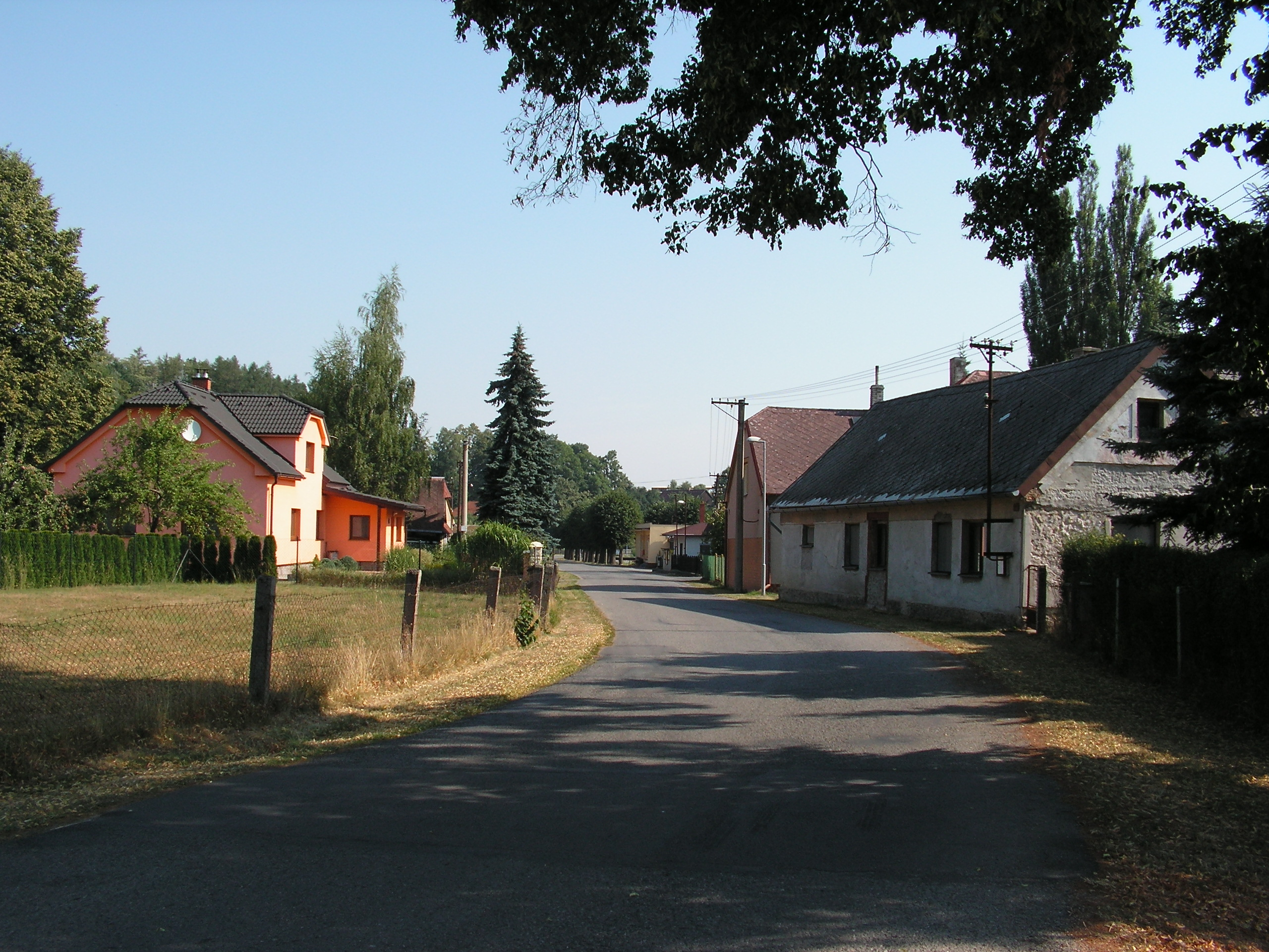 Obec Otradov v okrese Chrudim v Pardubickém kraji